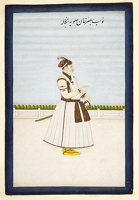 Ja'afar Ali Khan